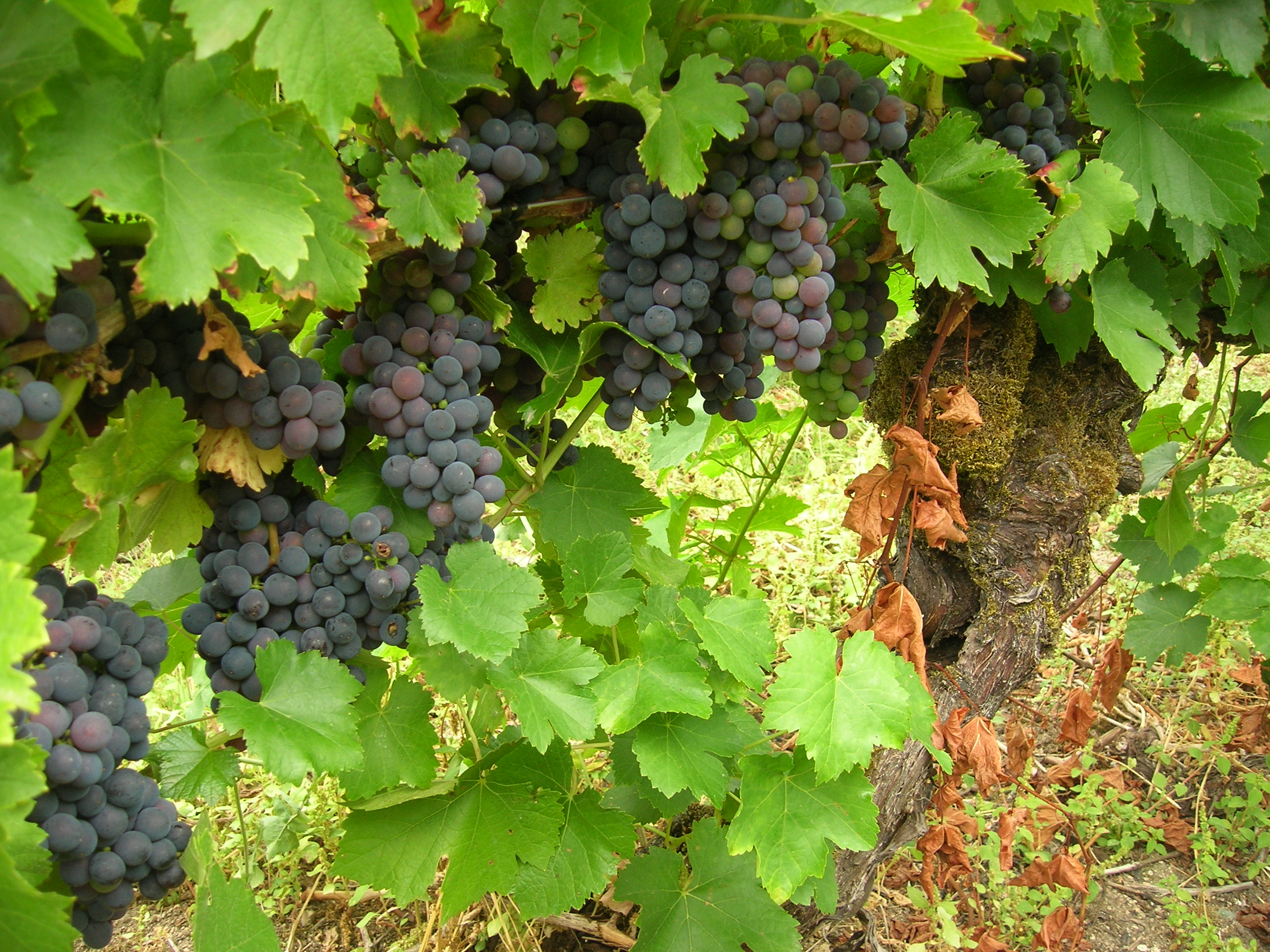 Imagen de racimos de la variedad Mencía en diferentes grados de maduración tomada en un viñedo de la D.O. "Ribeira Sacra" en el concello de Sober (Lugo)